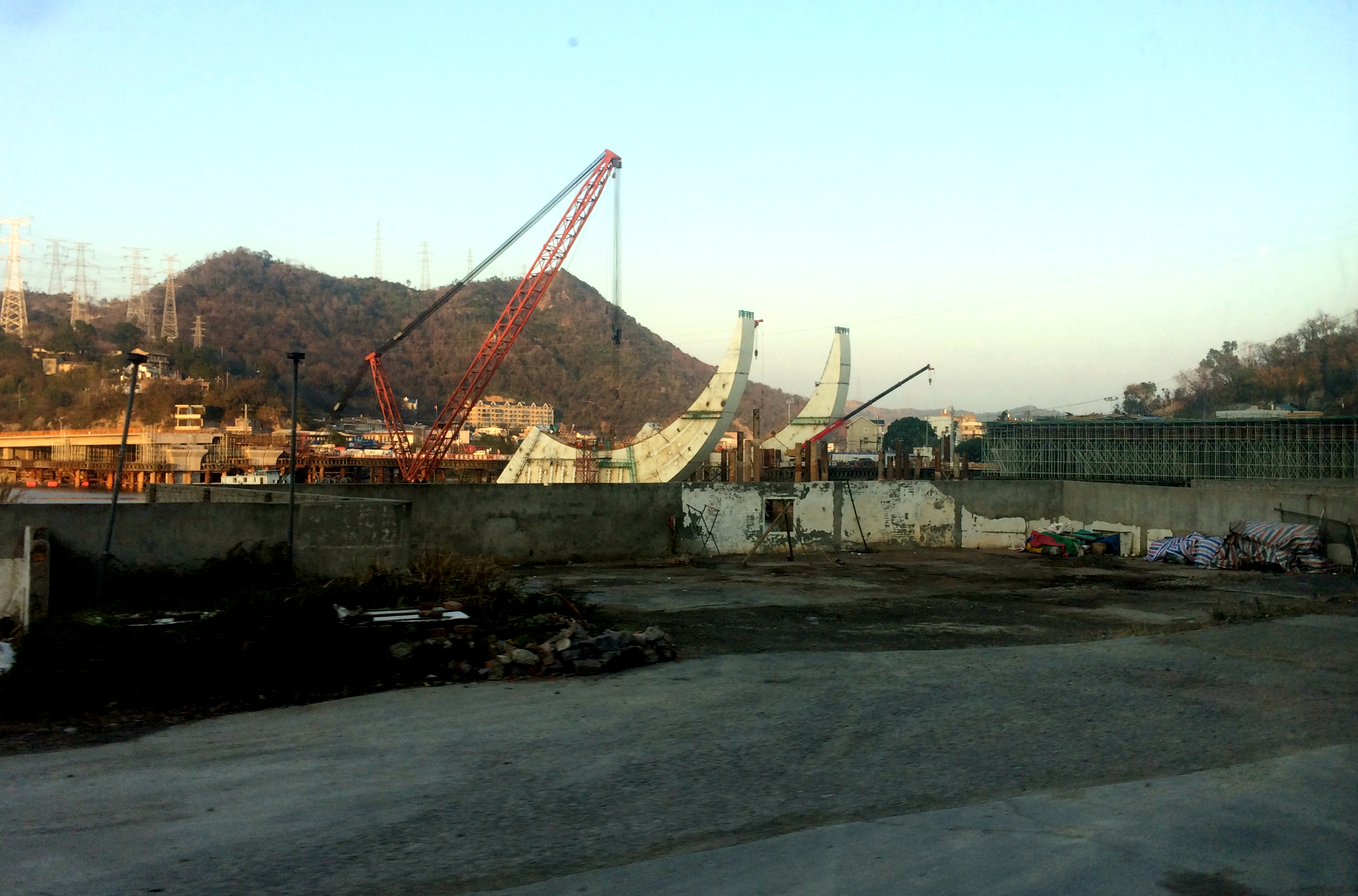 中文（中国大陆）: 漩门湾大桥